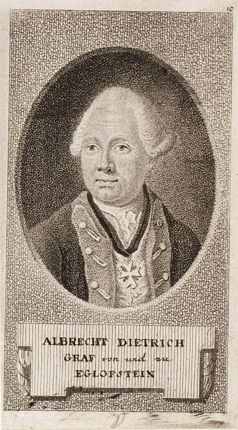 Bildnis Albrecht Dietrich Gottfried von und zu Egloffstein (1720-1791), 102 x 59 mm (Blatt); Wolfenbüttel, Herzog August Bibliothek, Inventar-Nr. A 5507